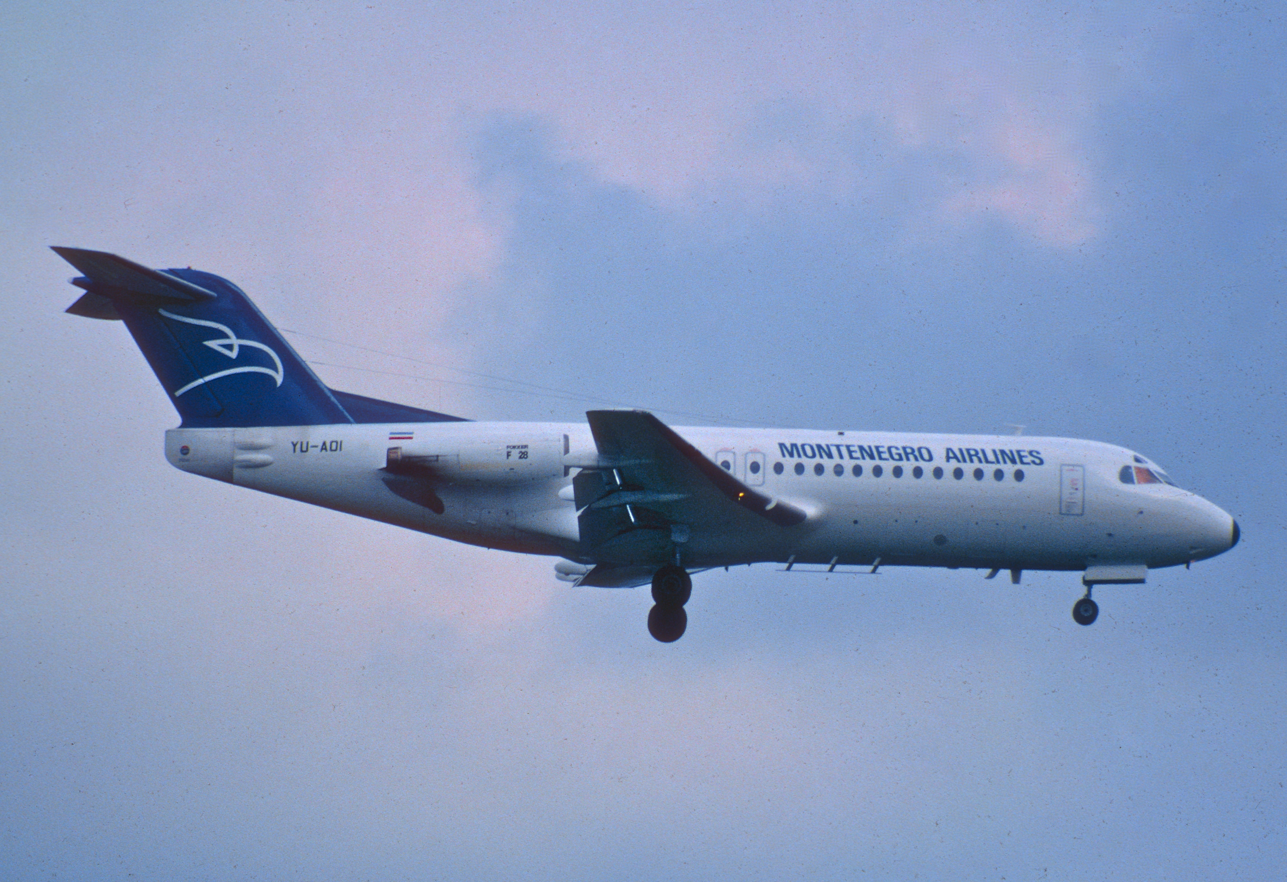 41ak - Montenegro Airlines Fokker F28 Fellowship 4000; YU-AOI@ZRH;09.10.1998